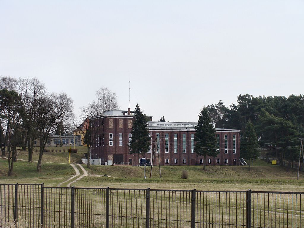 Szczecin Pilchowo - ujęcie wody